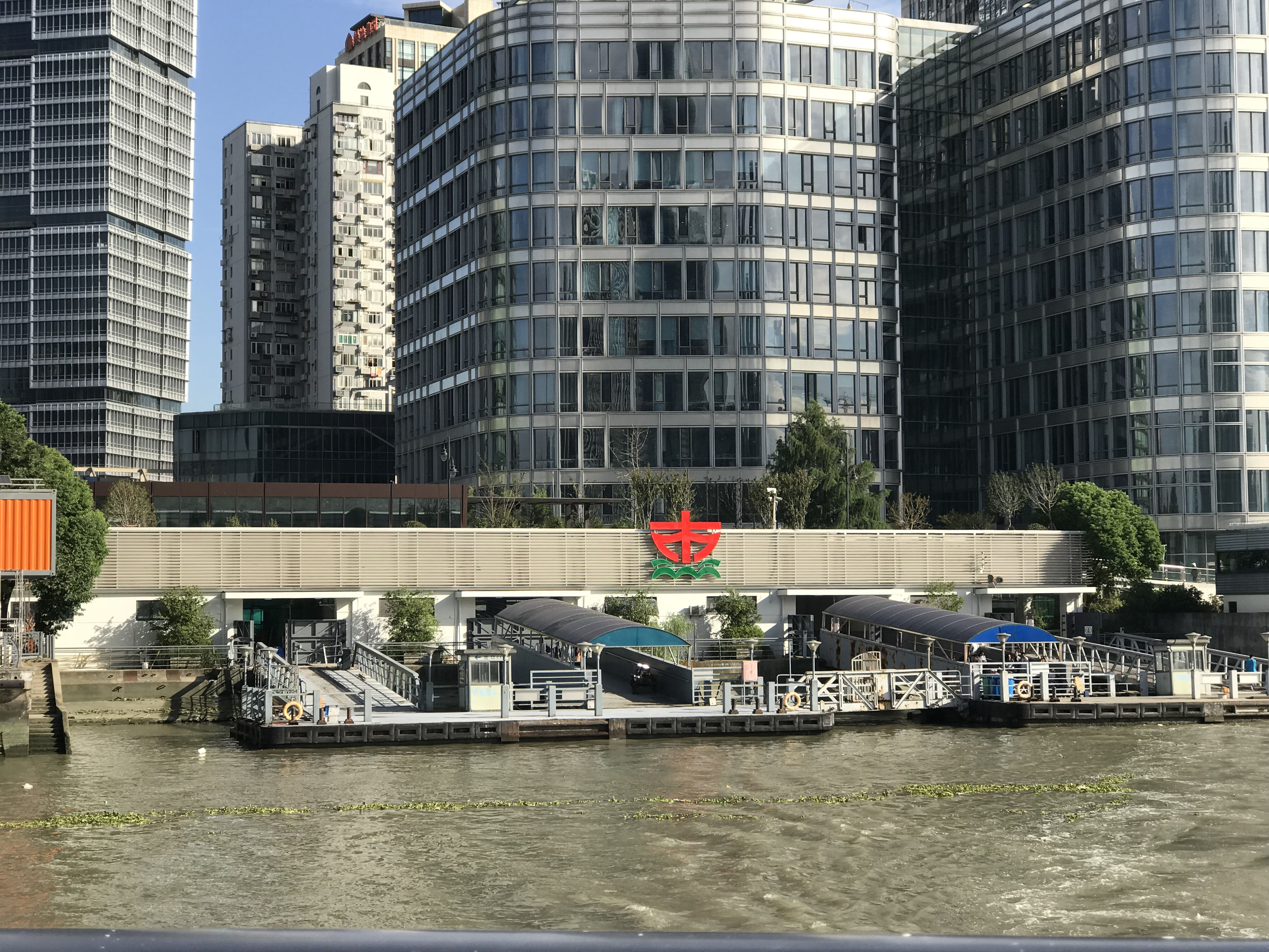 中文（中国大陆）: 自黄浦江轮渡上拍摄的公平路轮渡站